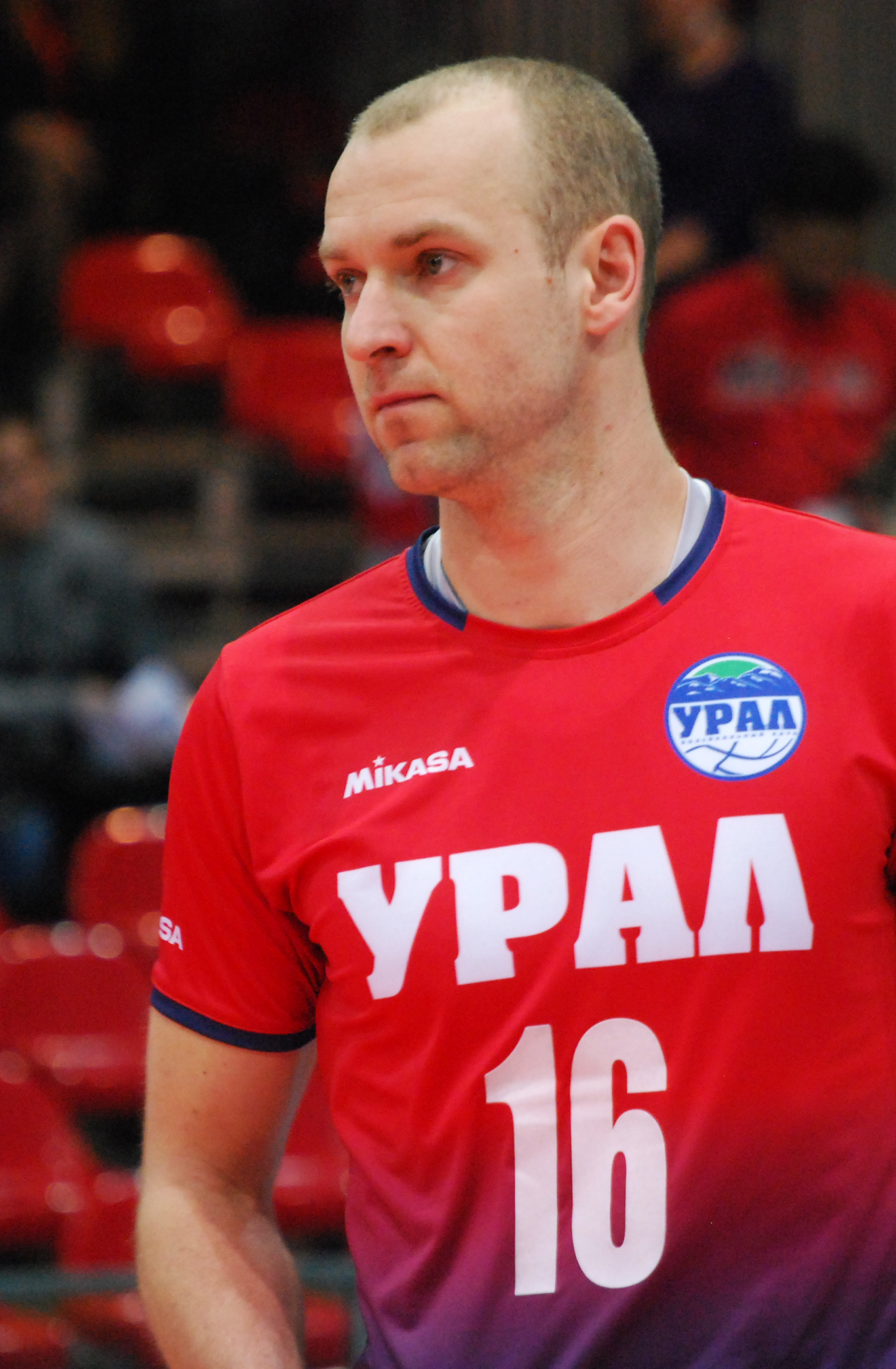 Aleksej Verbov